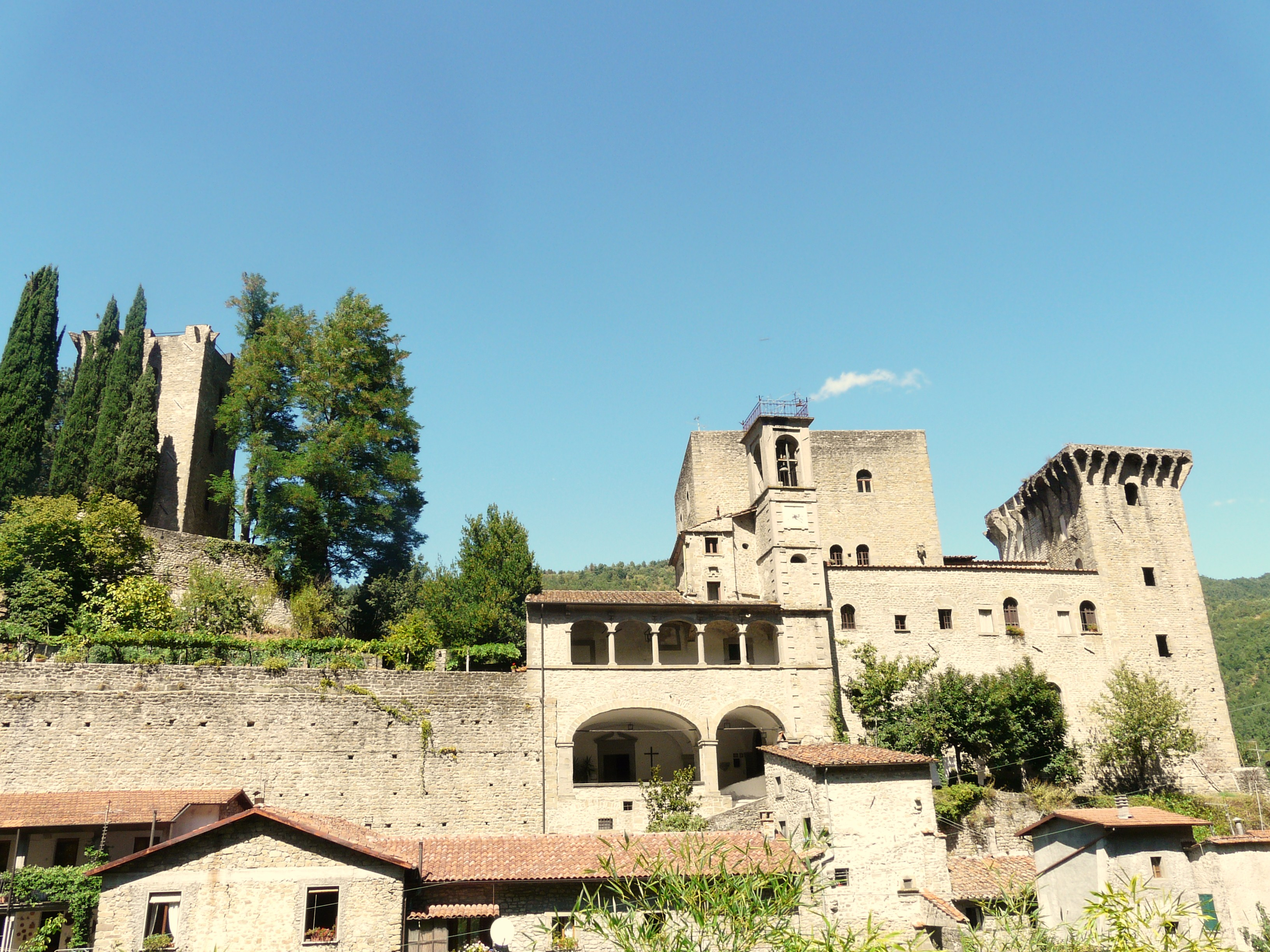 Fortezza della Verrucola dei Bosi, Fivizzano, Toscana, Italia